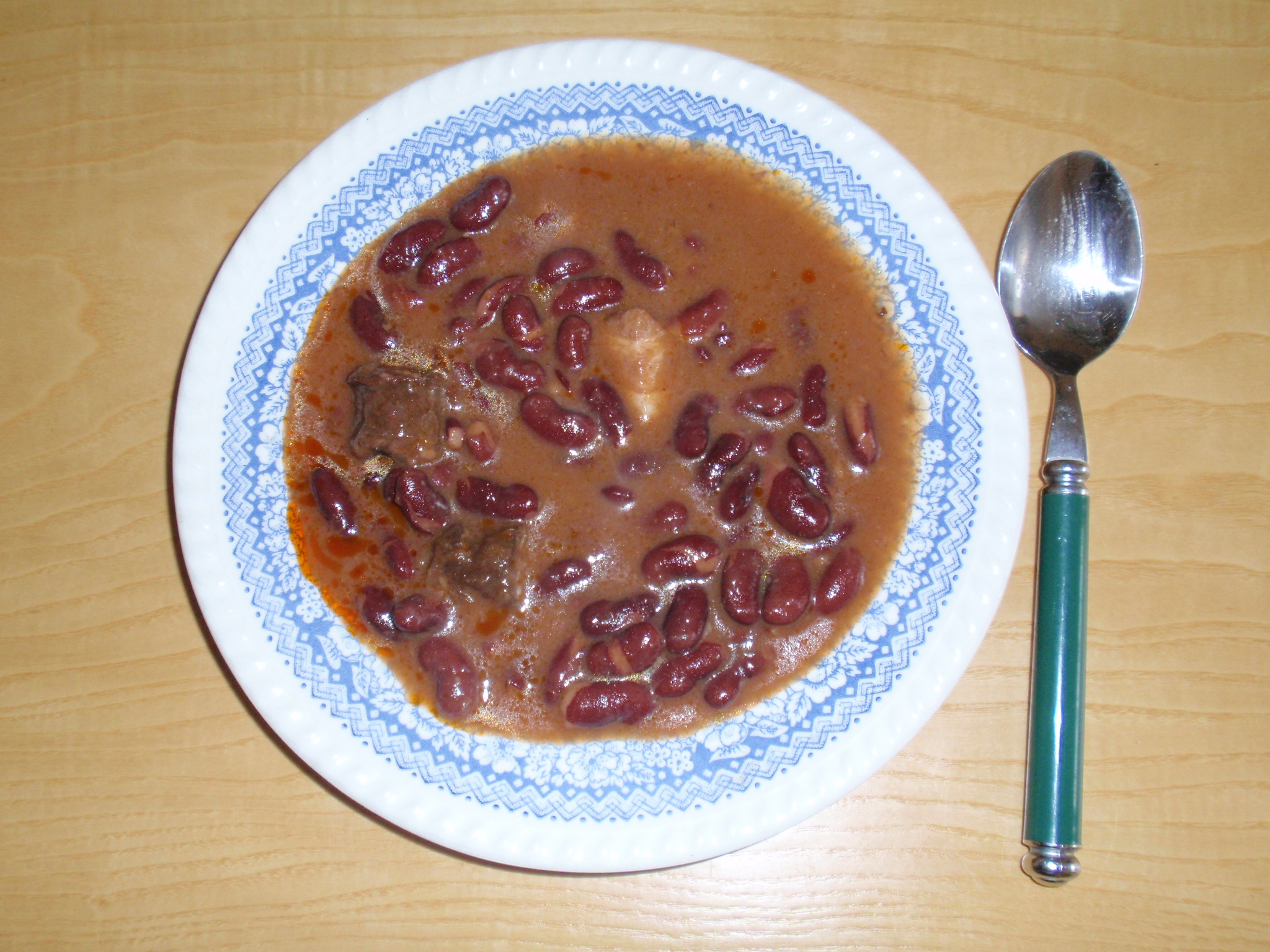 Tolosako babarrunak